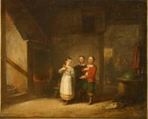 Le Prétendant, Présentation à la jeune Fiancée